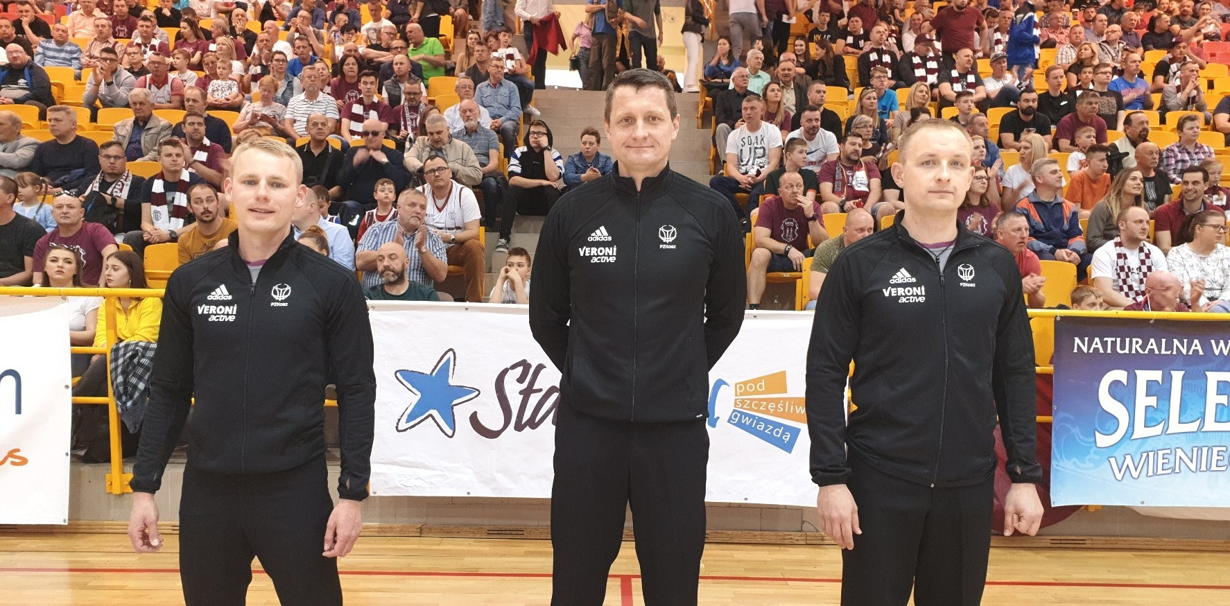 Sędziowie Spójnia - Stal Ostrów